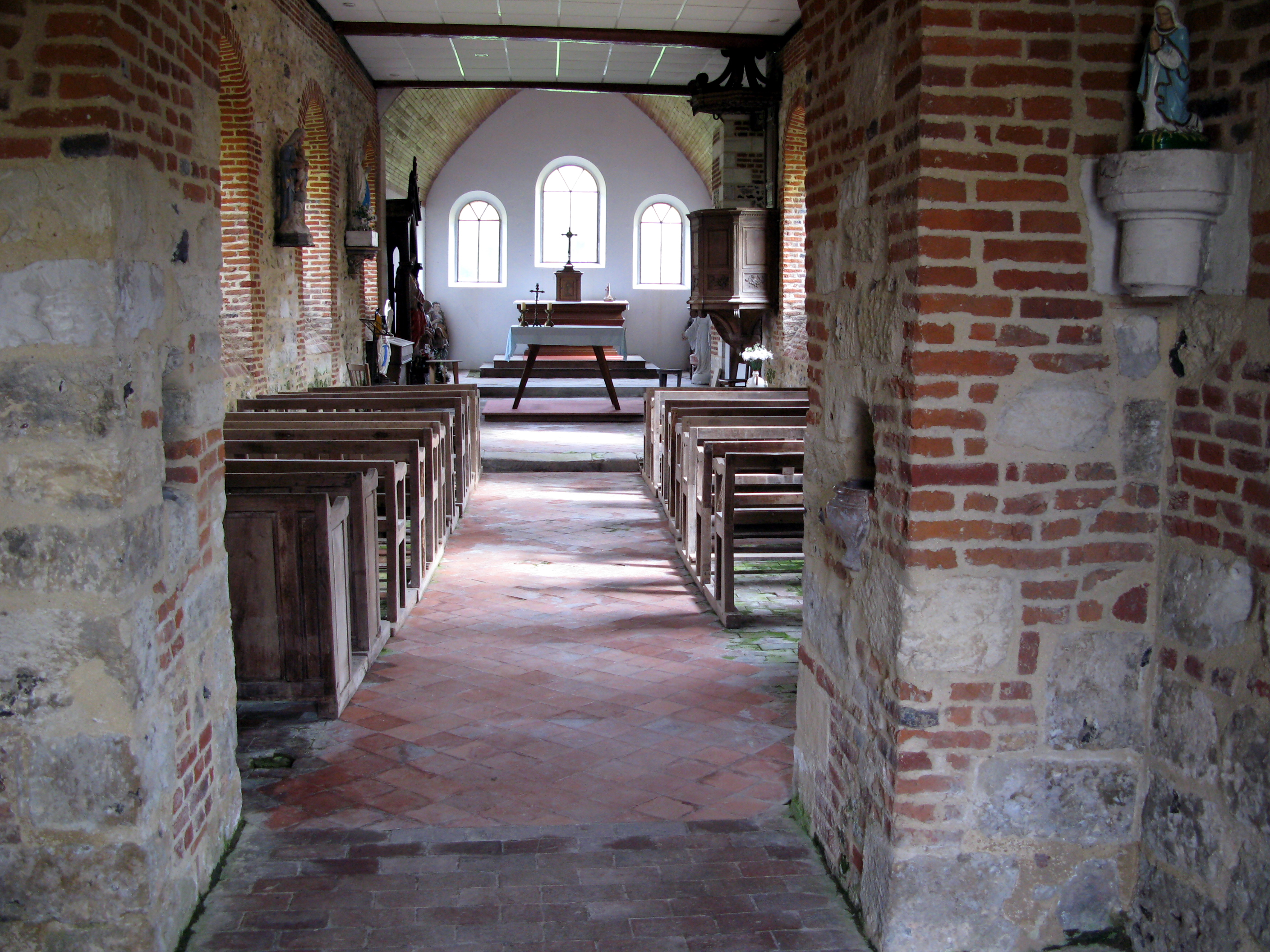 Lugny (Aisne, France) - L'église fortifiée. Sobre intérieur d'église rurale, vu depuis l'entrée sous le clocher, caractérisé par des murs épais.